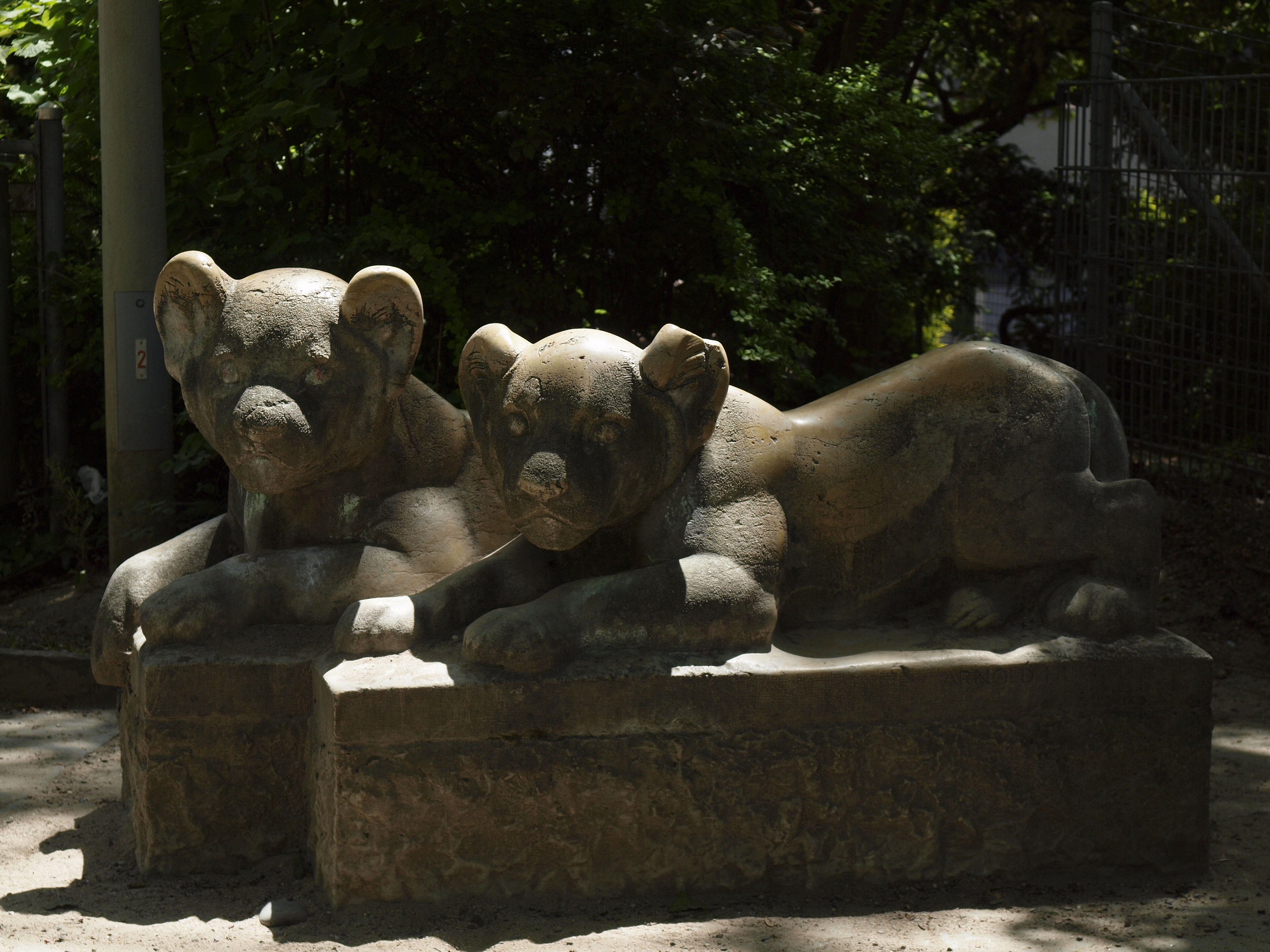 Die Skulptur zweier kleiner Löwen wurde von Arnold Huggler im Jahr 1942 geschaffen. Seit 1945 ist sie in der Grünanlage Landenberg in Zürich Wipkingen aufgestellt.